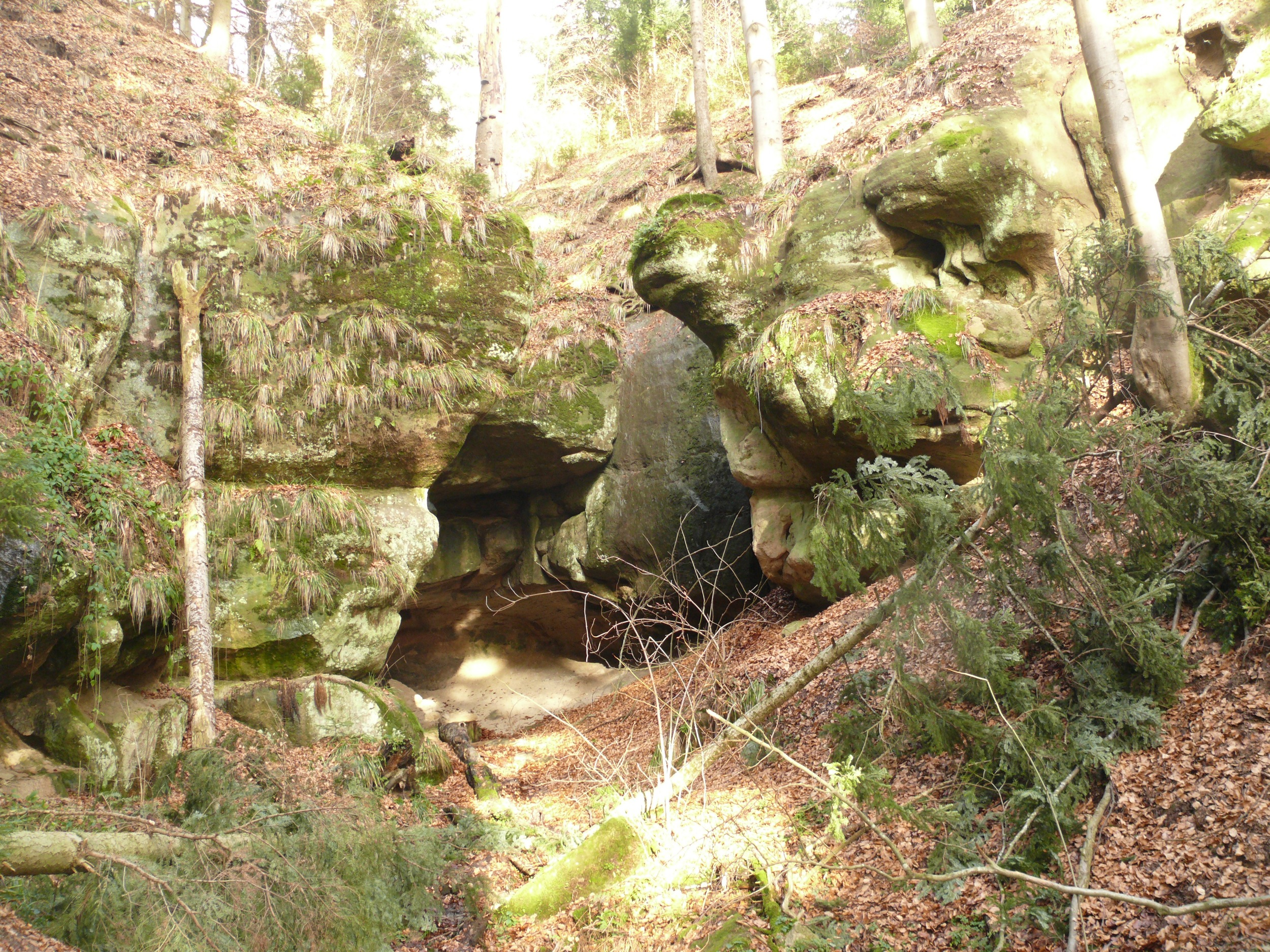 Teufelsküche bei Gschwend